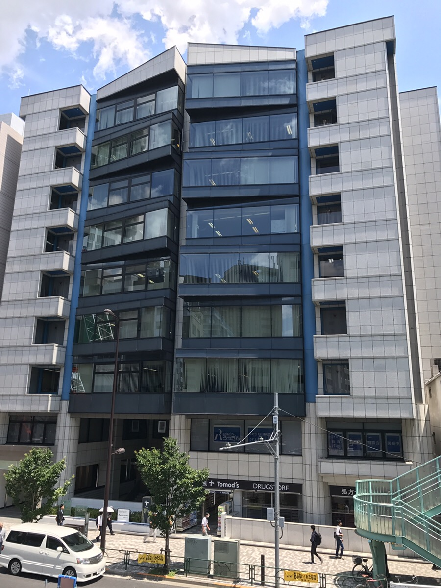 〒150-0002 東京都渋谷区渋谷３丁目１０−１３ TOKYU REIT 渋谷 R ビル